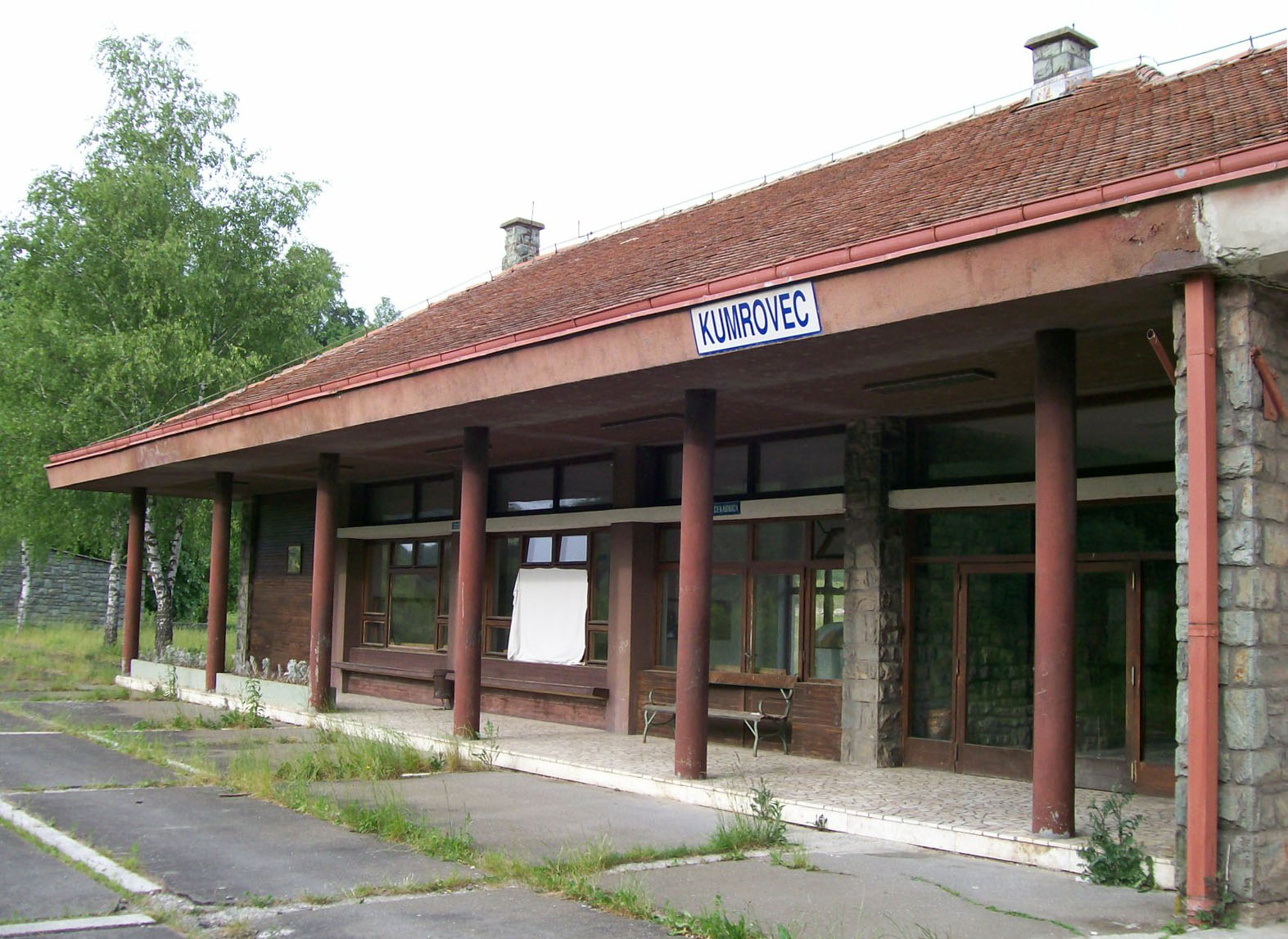 Željeznička stanica u Kumrovcu